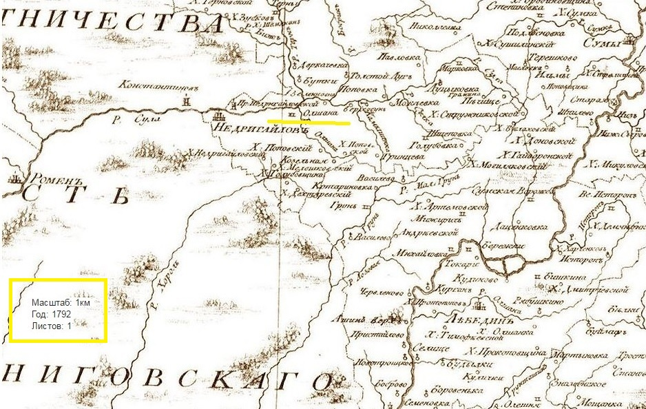 Карта _1792 год